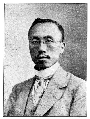 中華民國國會議員